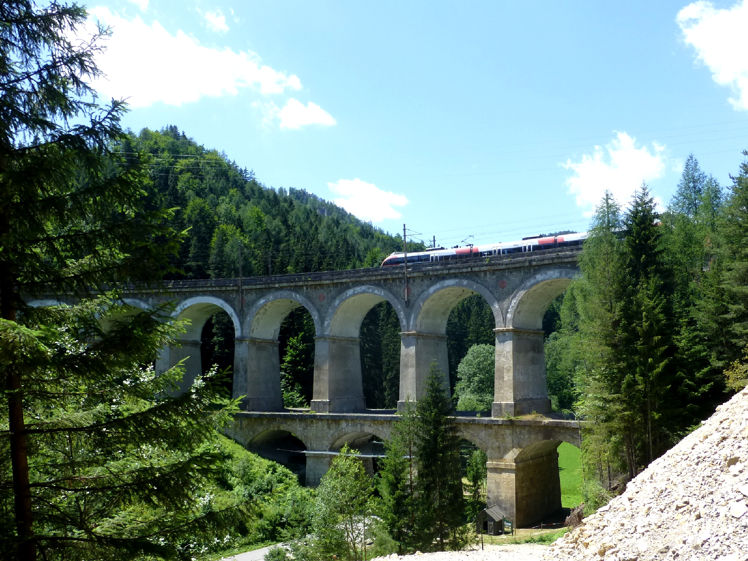 Kalte Rinne Viadukt Semmeringbahn Austria